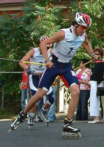 Jonny Spillane during the Sommer Gand Prix in Steinbach-Hallenberg